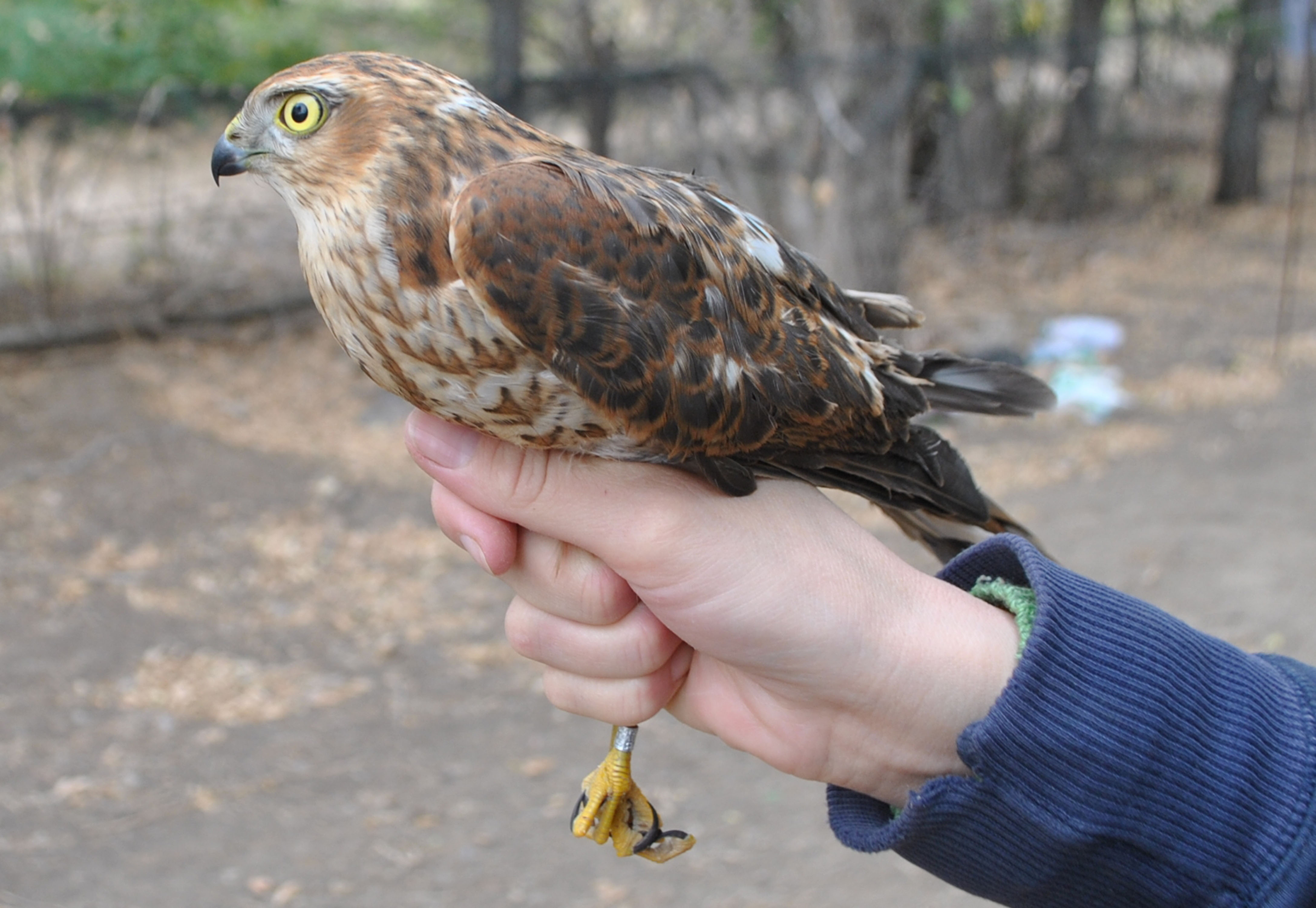 Accipiter nisus